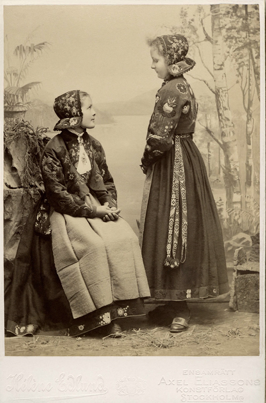 Två unga flickor poserar i dräkter med blommiga jackor och hättor